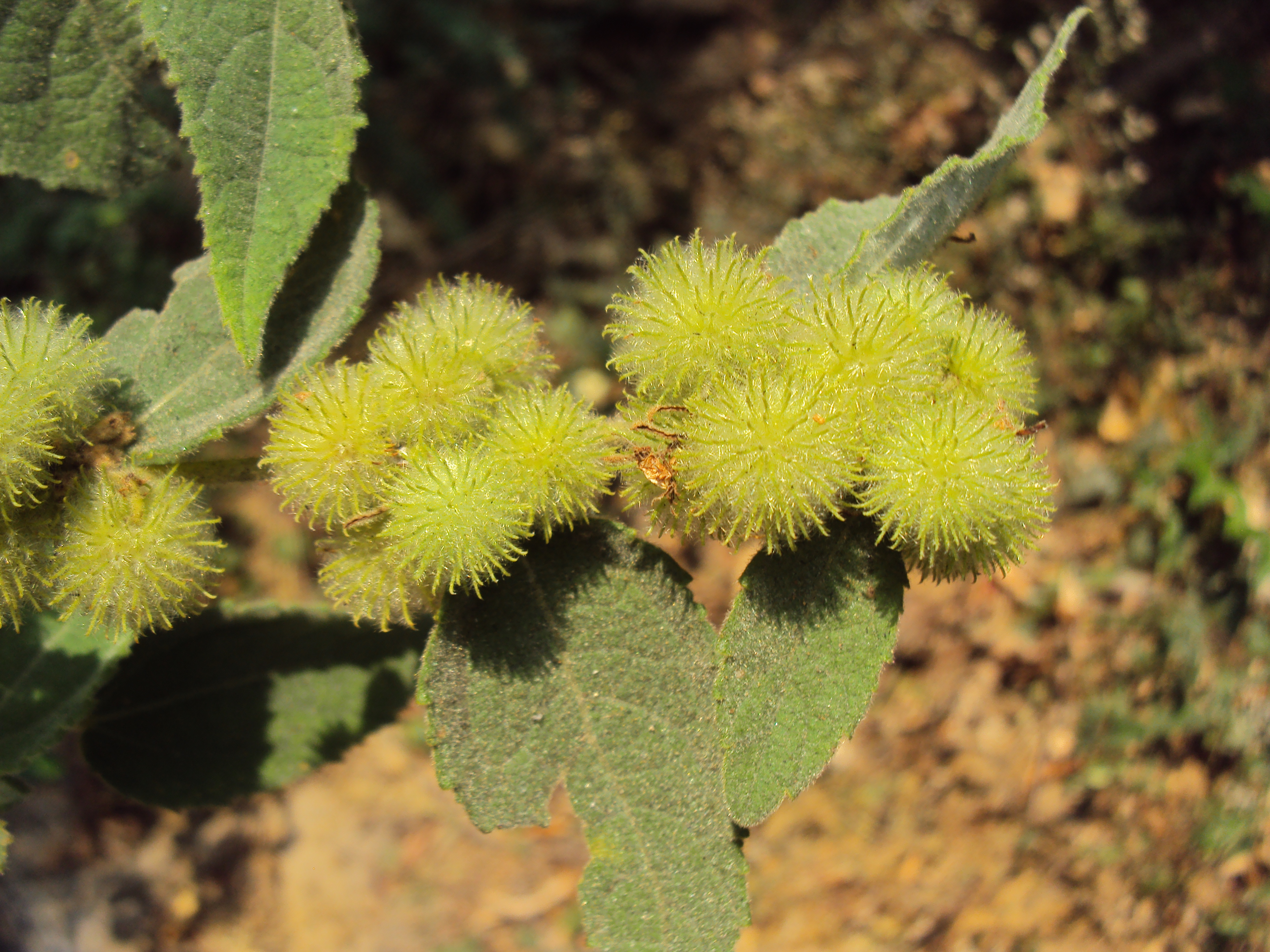 Photos by Vinayaraj